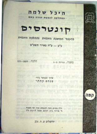 שער קונטרס הלימוד היומי של הרב פינחס קהתי.